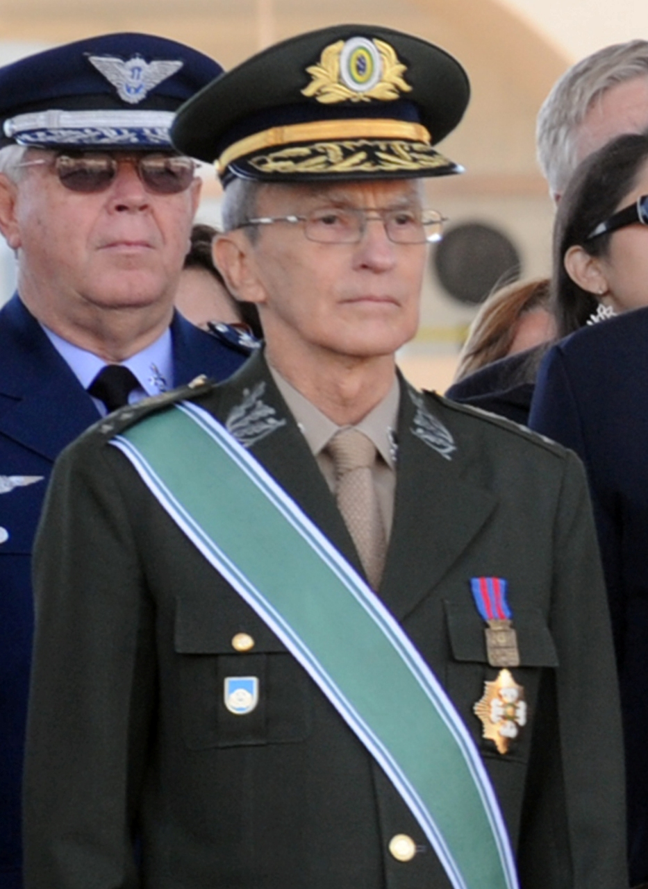 Comandante do Exército Enzo Peri em homenagem ao dia do Soldado.